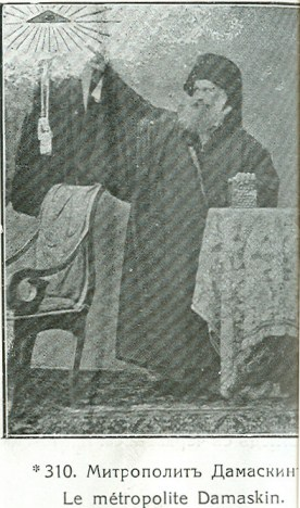 Дамаскин Велешки.